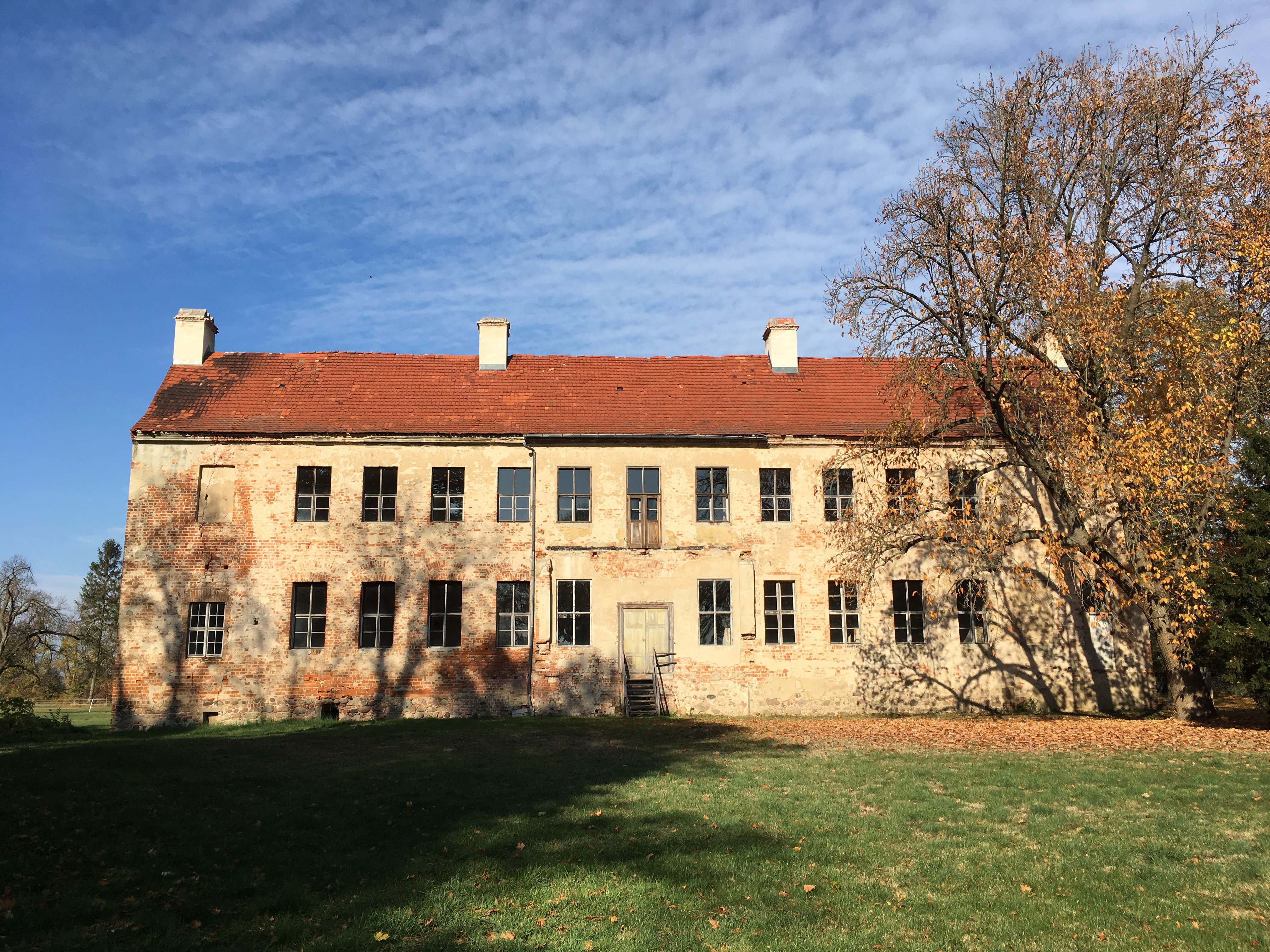 Das Schloss Münchehofe – offizielle Bezeichnung Herrenhaus mit Park – entstand in der Zeit um 1640 und weist als Besonderheit eine Kapelle im rechten Giebel des Gebäudes auf.